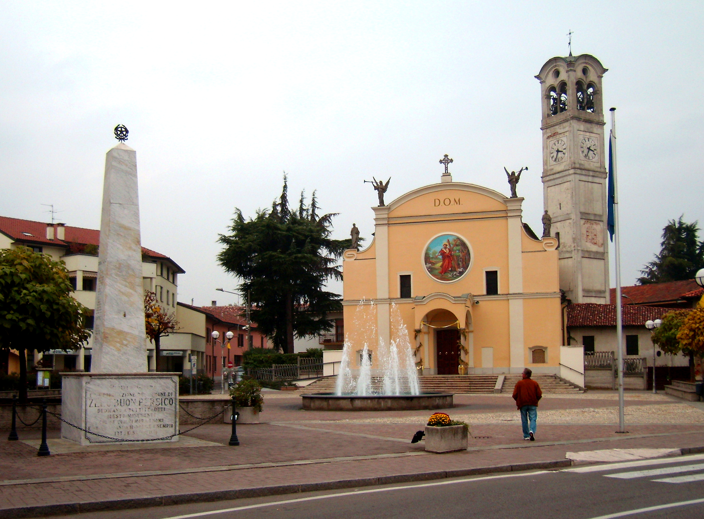 Die "Piazza Italia" ("Platz Italien") mit der den Heiligen Cosmas und Damian gewidmeten Pfarrkirche in der italienischen Gemeinde Zelo Buon Persico (Provinz Lodi/Region Lombardei